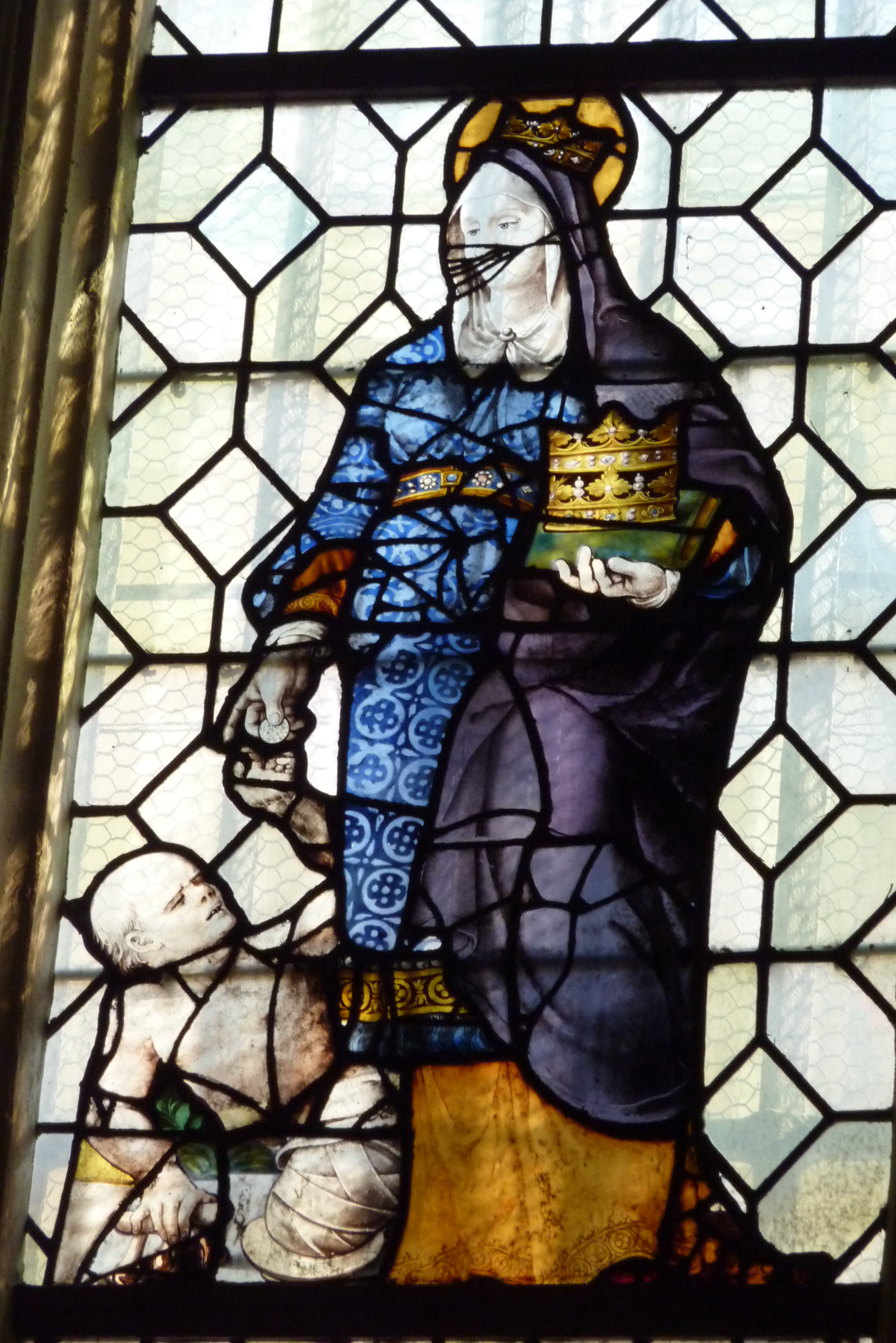 Glasfenster in der Kirche St-Étienne-du-Mont in Paris, Darstellung: Elisabeth von Ungarn